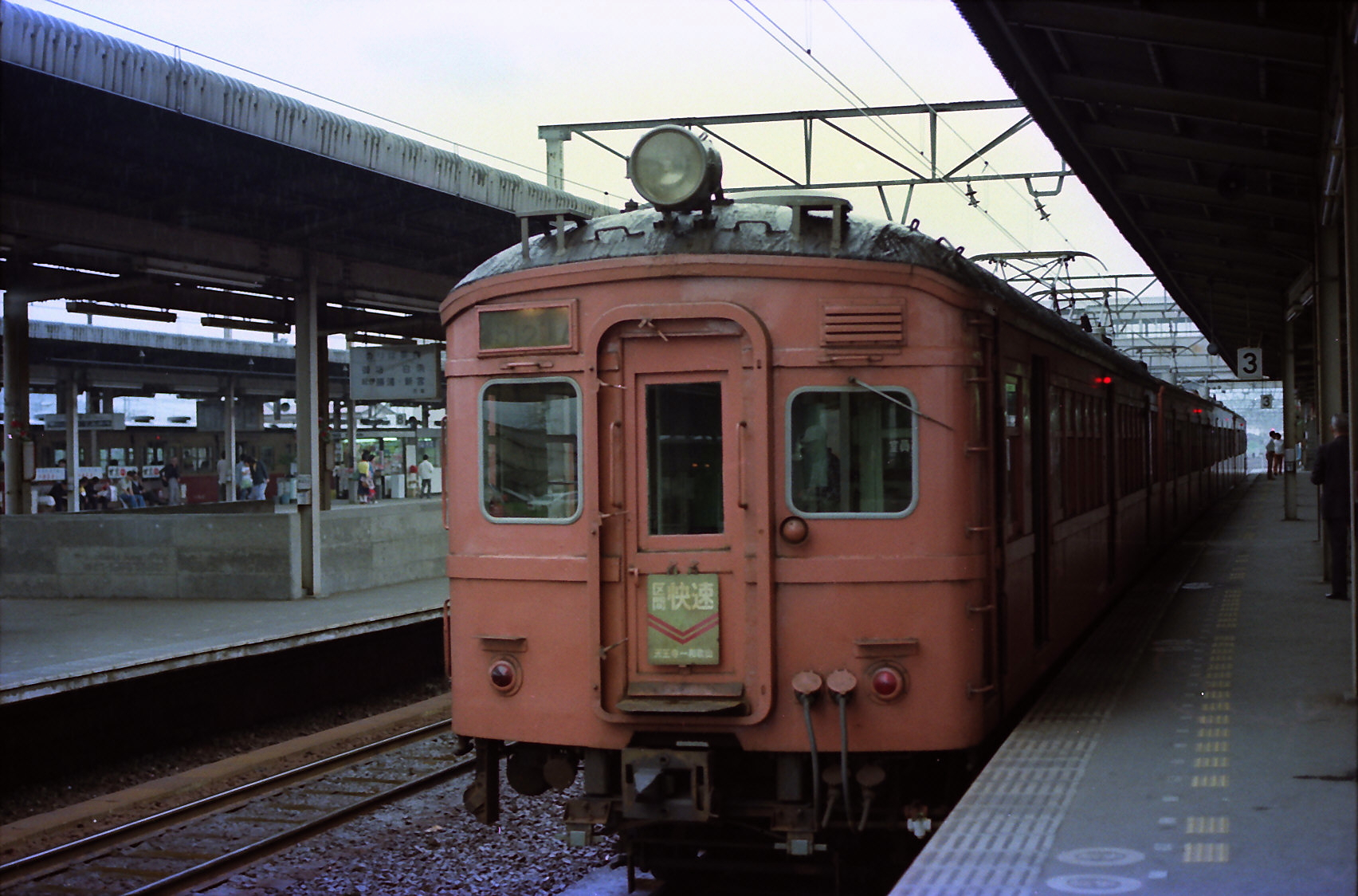 和歌山駅 クモハ60形 阪和線